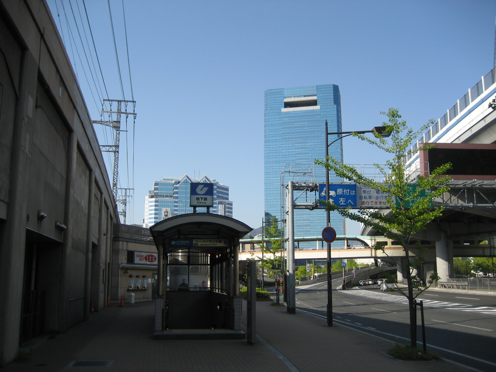 Subway Harborland